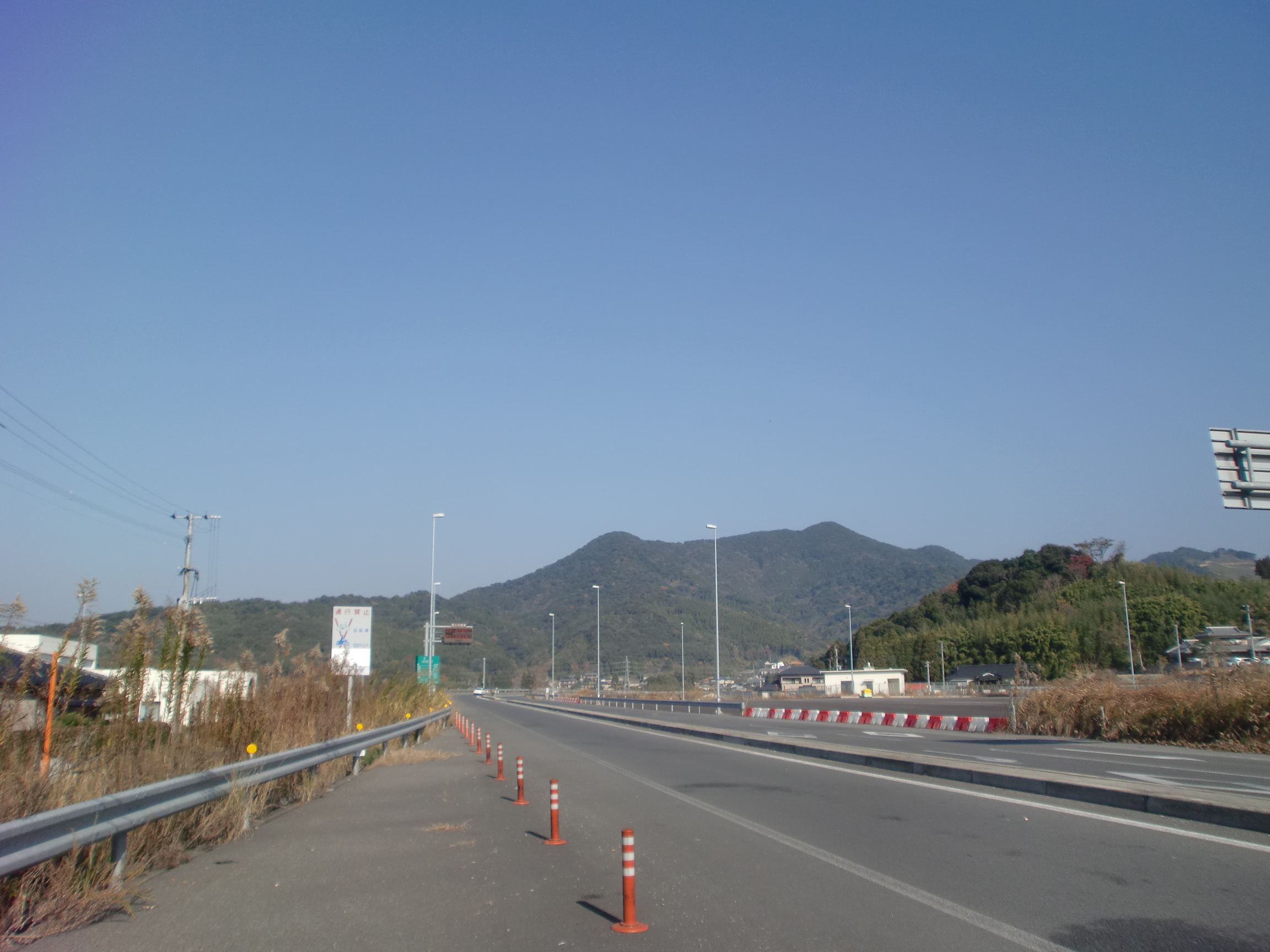 南九州西回り自動車道串木野インターチェンジの入り口。